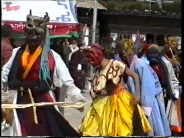 Jakhar City, Tamshin-Lhakang monastery, Bhutan